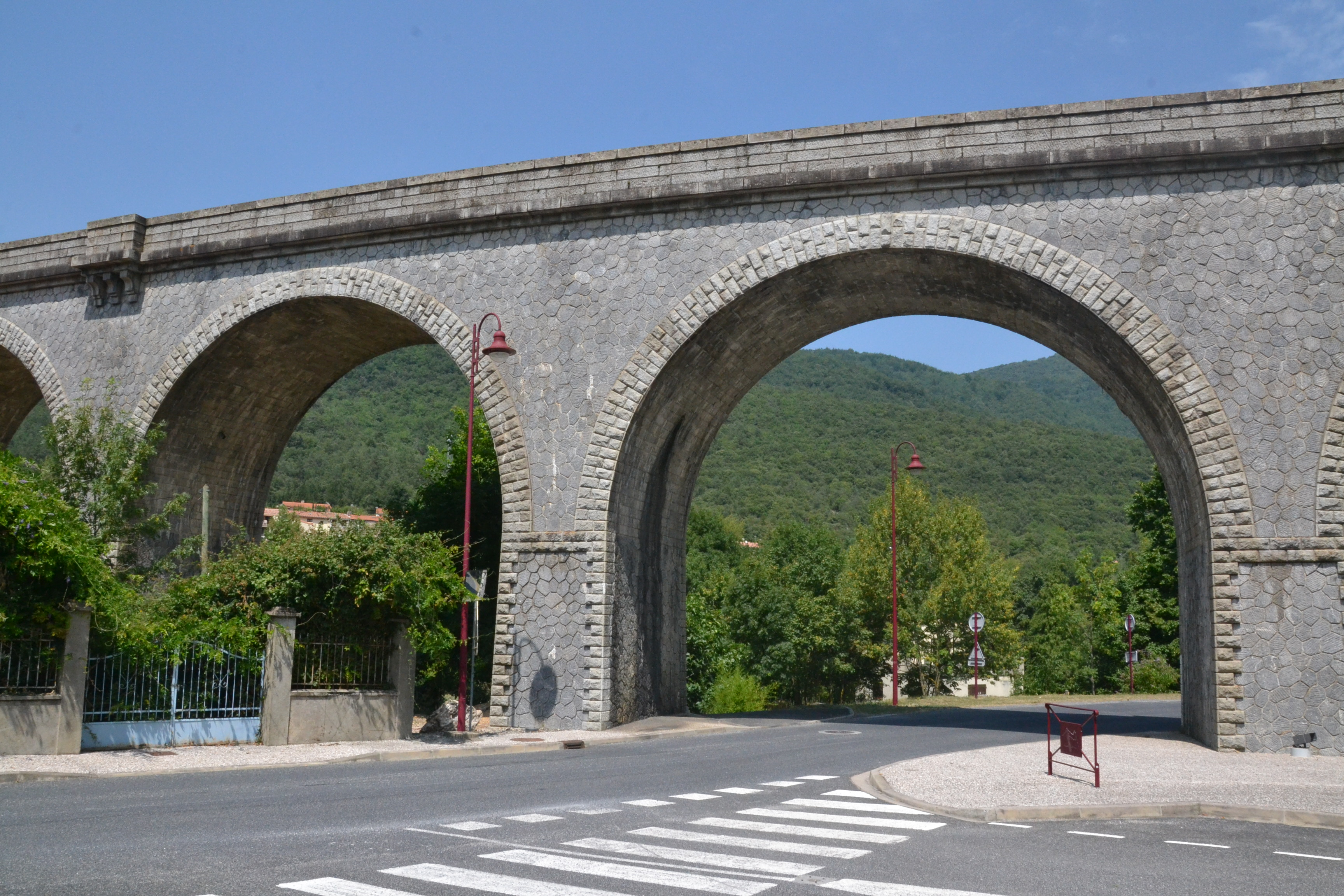 Pont ferroviaire, ligne de Carcassonne à Rivesaltes, commune de Puilaurens (Aude, France).